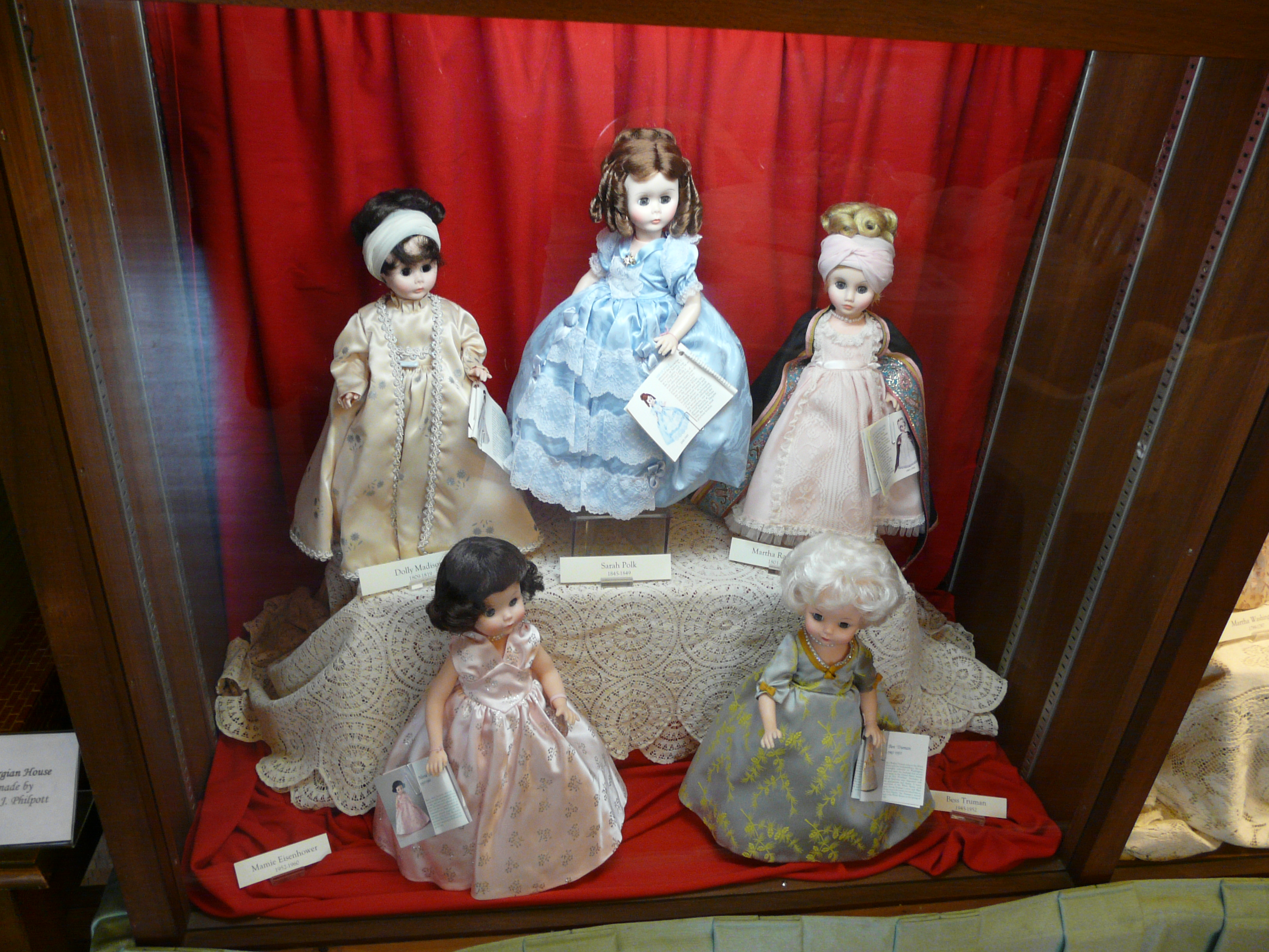 Denver, summer 2012